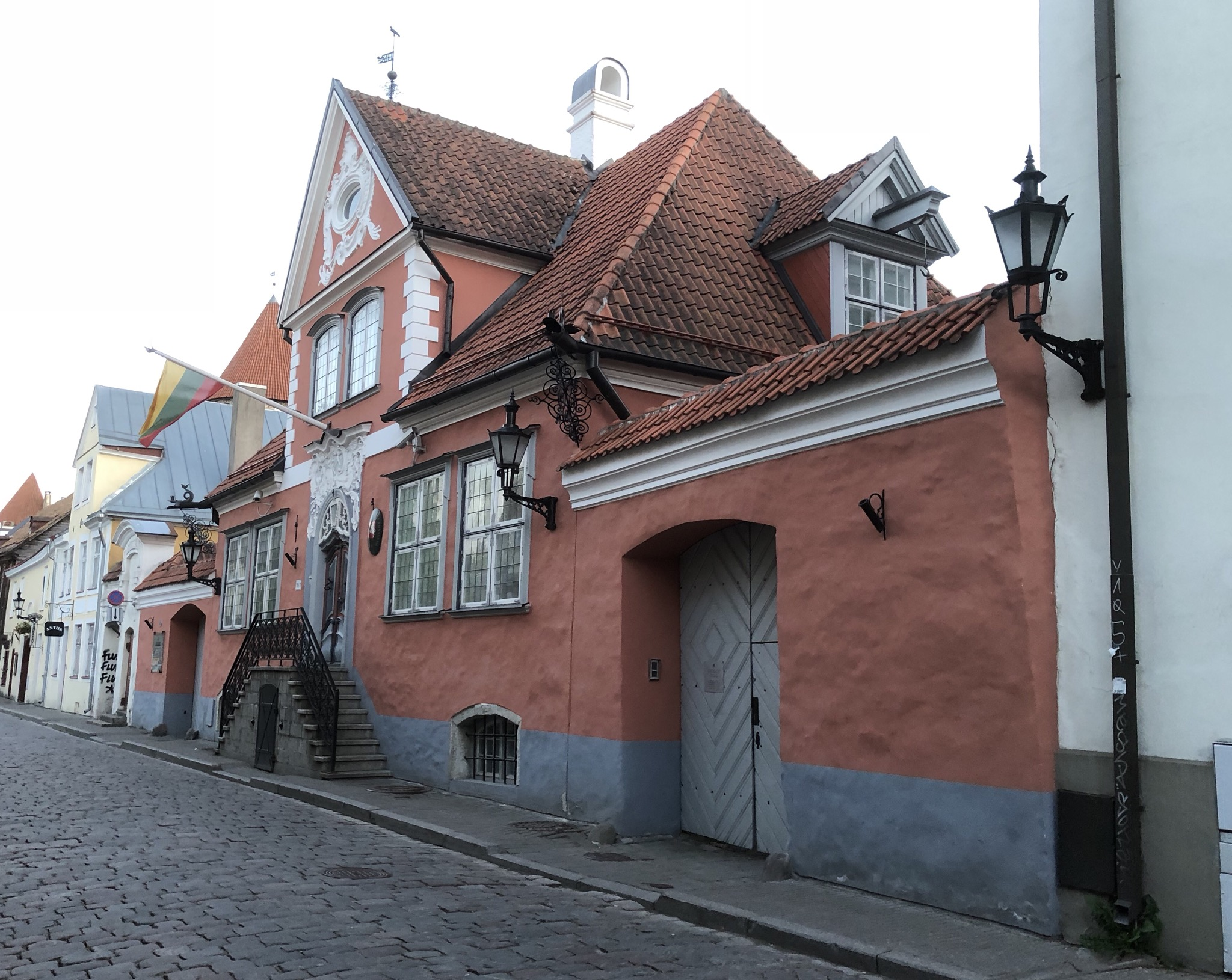 Litauische Botschaft in Estland